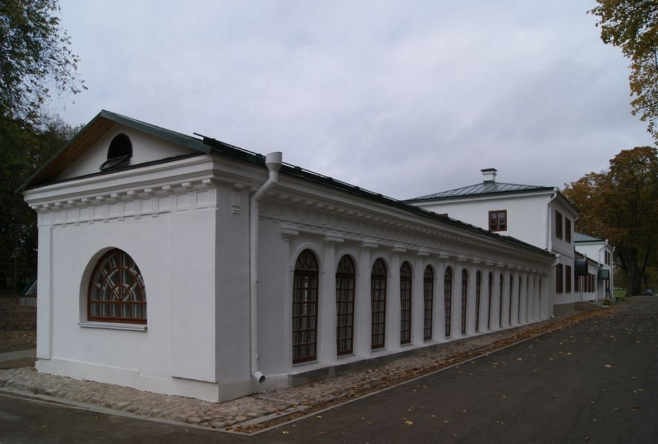 Сядзіба Агінскіх у Залессі пасля рэстаўрацыі